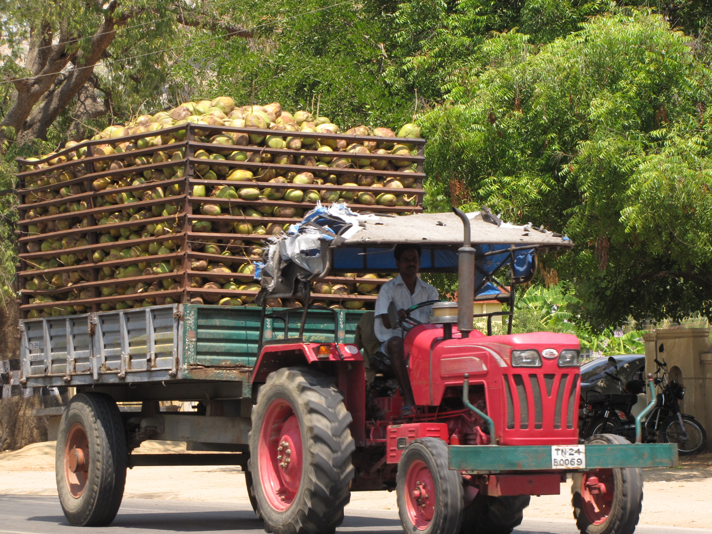 Krishnagiri, Tamil Nadu State